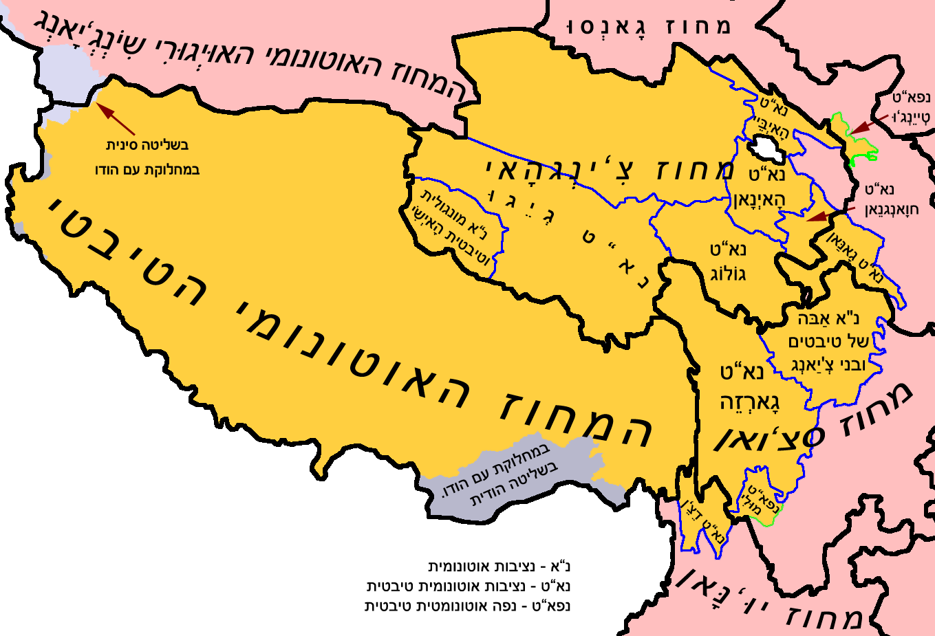 מחוזות, נציבויות ונפות טיבטיות